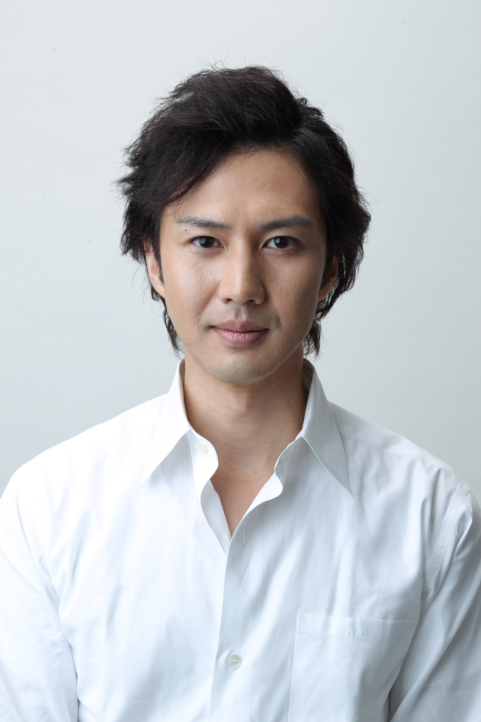 宝井誠明 Masaaki Takarai